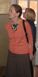 Zoja Mellov Erakonna Eestimaa Rohelised arengu teemalises avatud ruumis Tallinnas